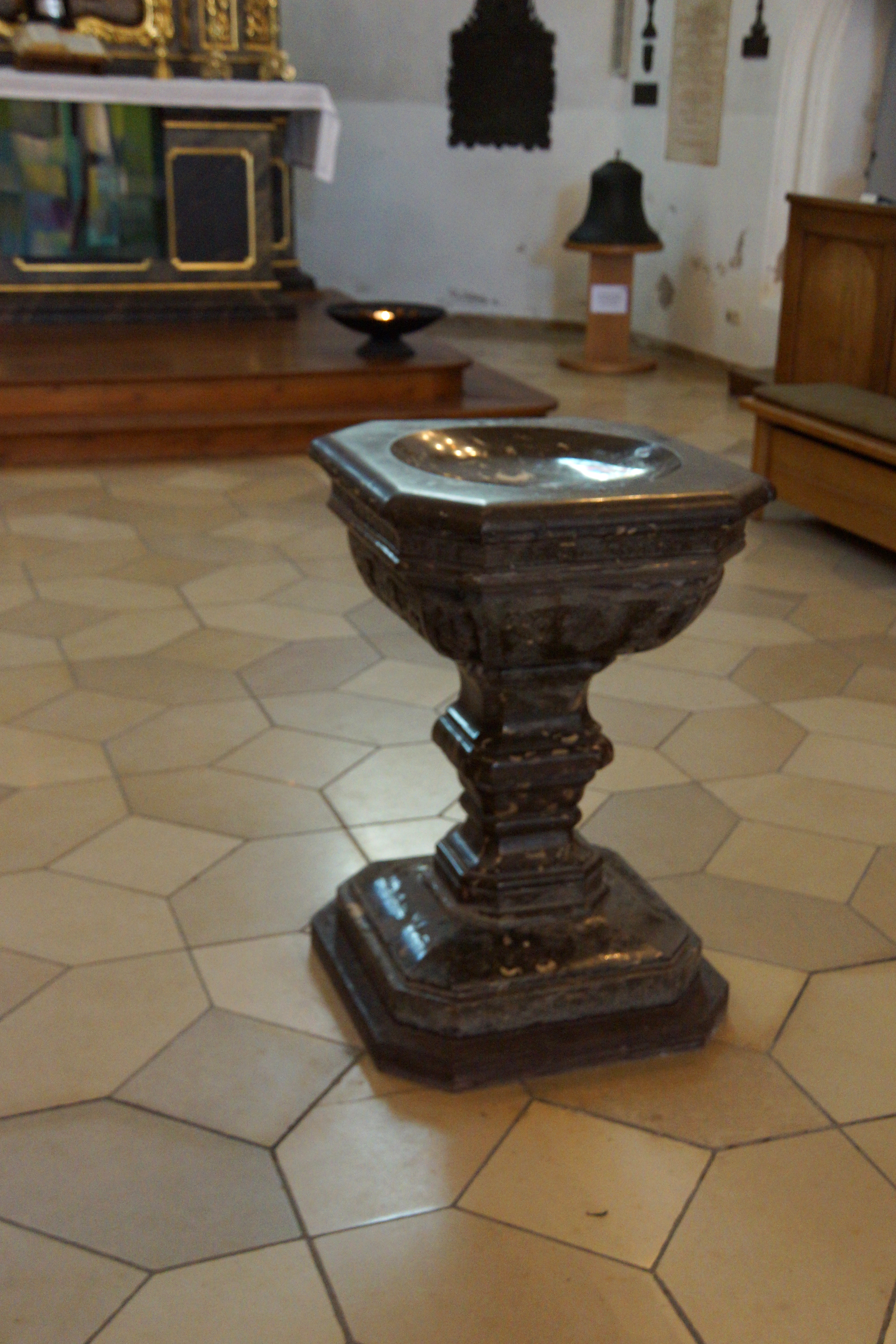 Die evangelische Pfarrkirche St. Laurentius in Altdorf bei Nürnberg